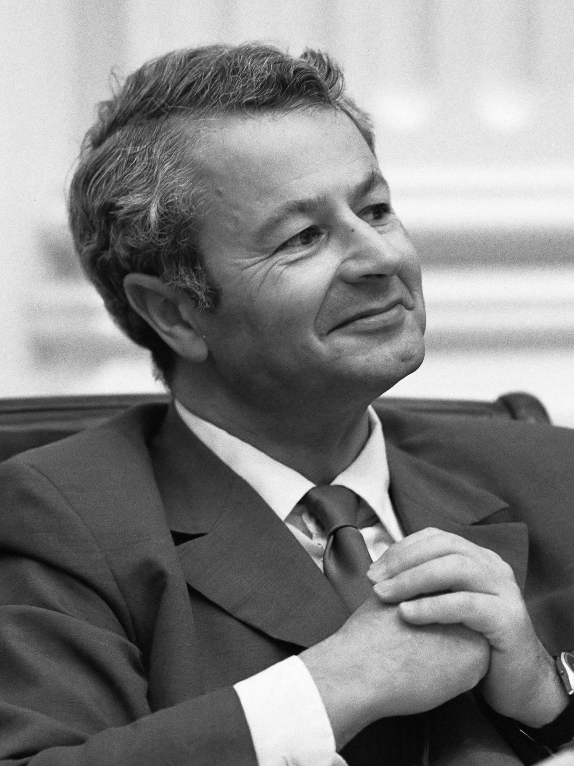 Tweede Kamer, behandeling Voorjaarsnota; minister Rood van Binnenlandse Zaken 22 juni 1982